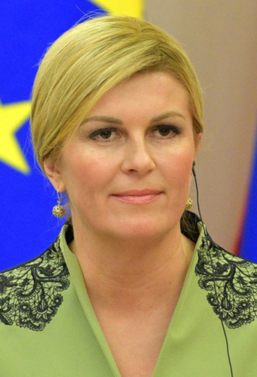 Заявления для прессы по итогам российско-хорватских переговоров. Президент Республики Хорватии Колинда Грабар-Китарович